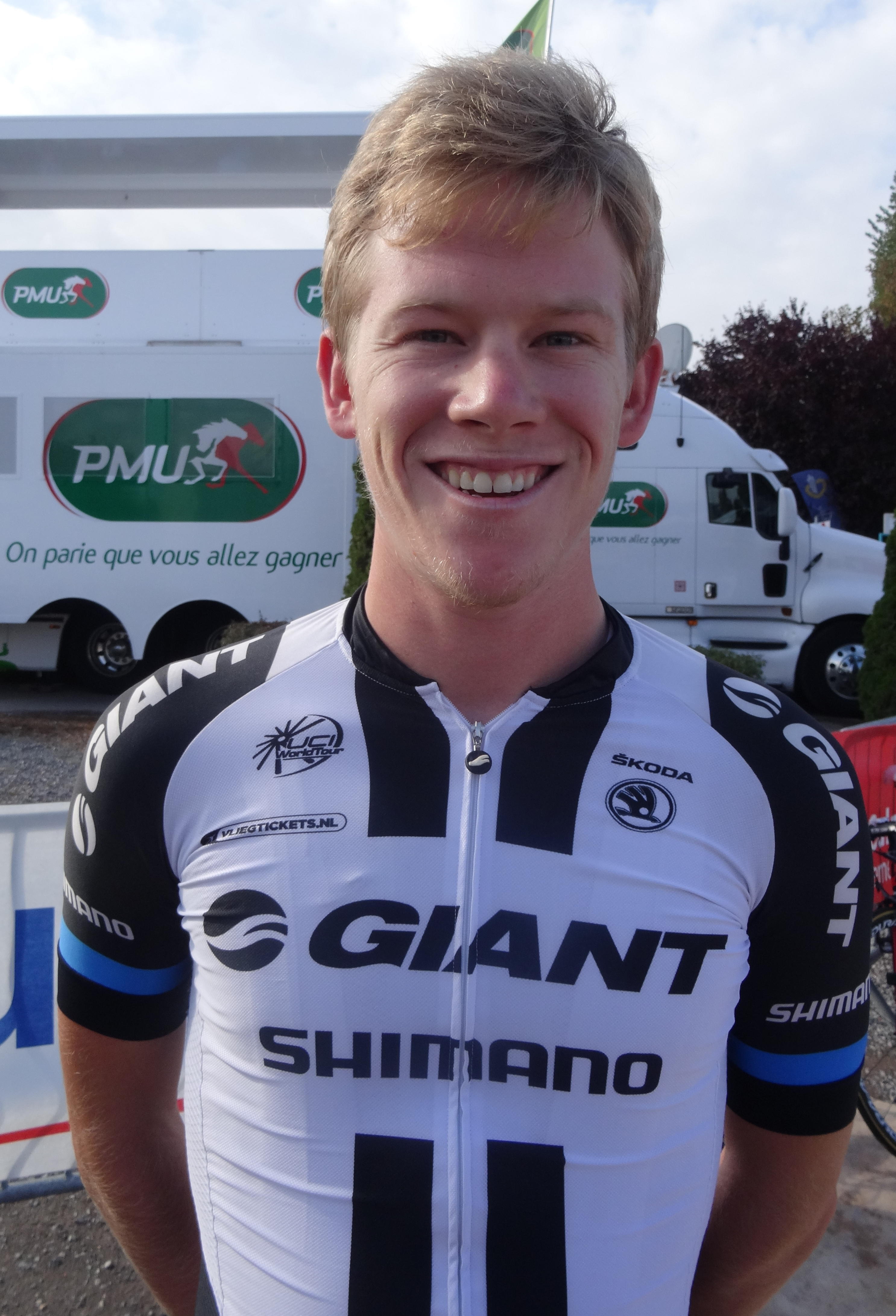 Reportage réalisé le dimanche 21 septembre à l'occasion du départ et de l'arrivée du Grand Prix d'Isbergues 2014 à Isbergues, Nord-Pas-de-Calais, France.